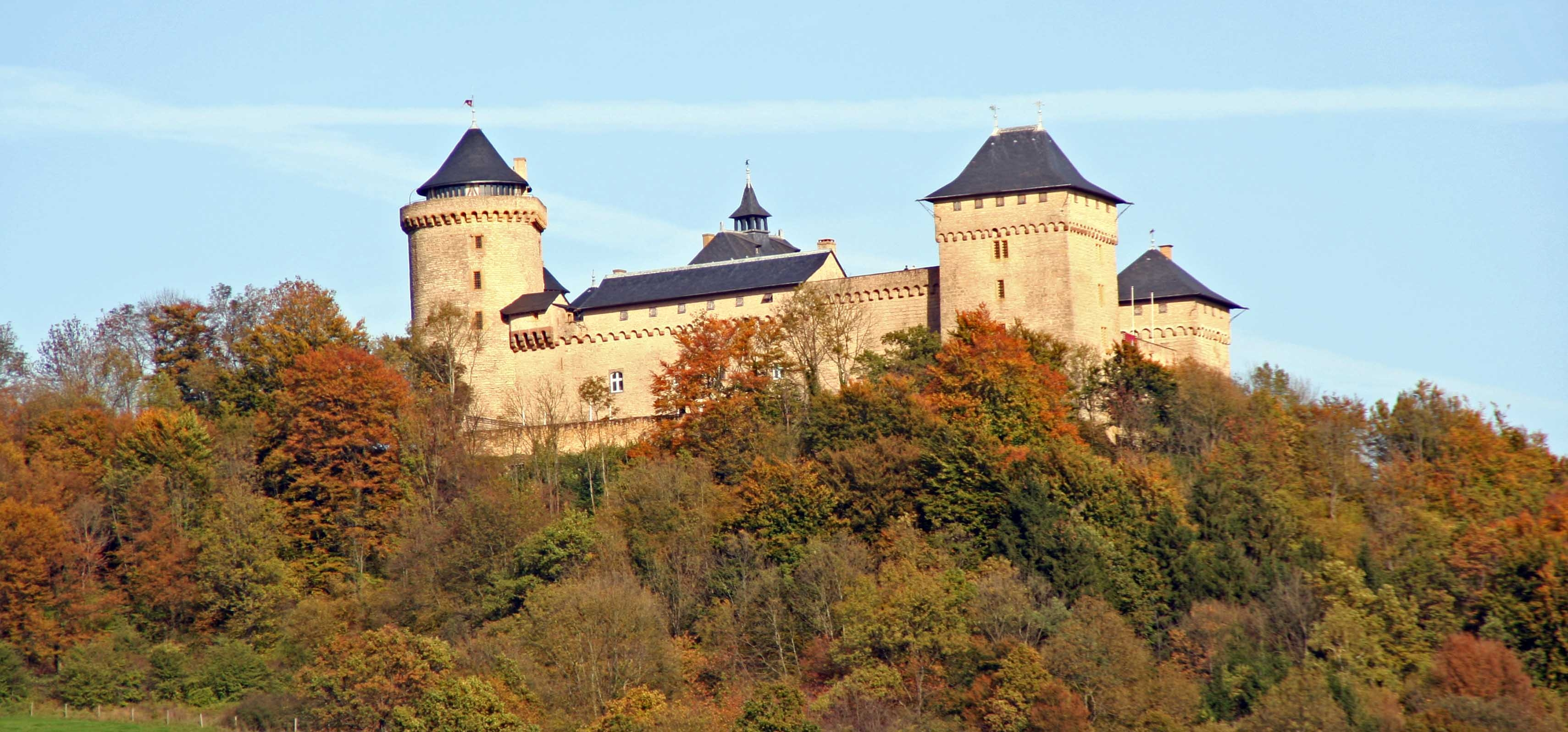 Buerg Malbrouck.